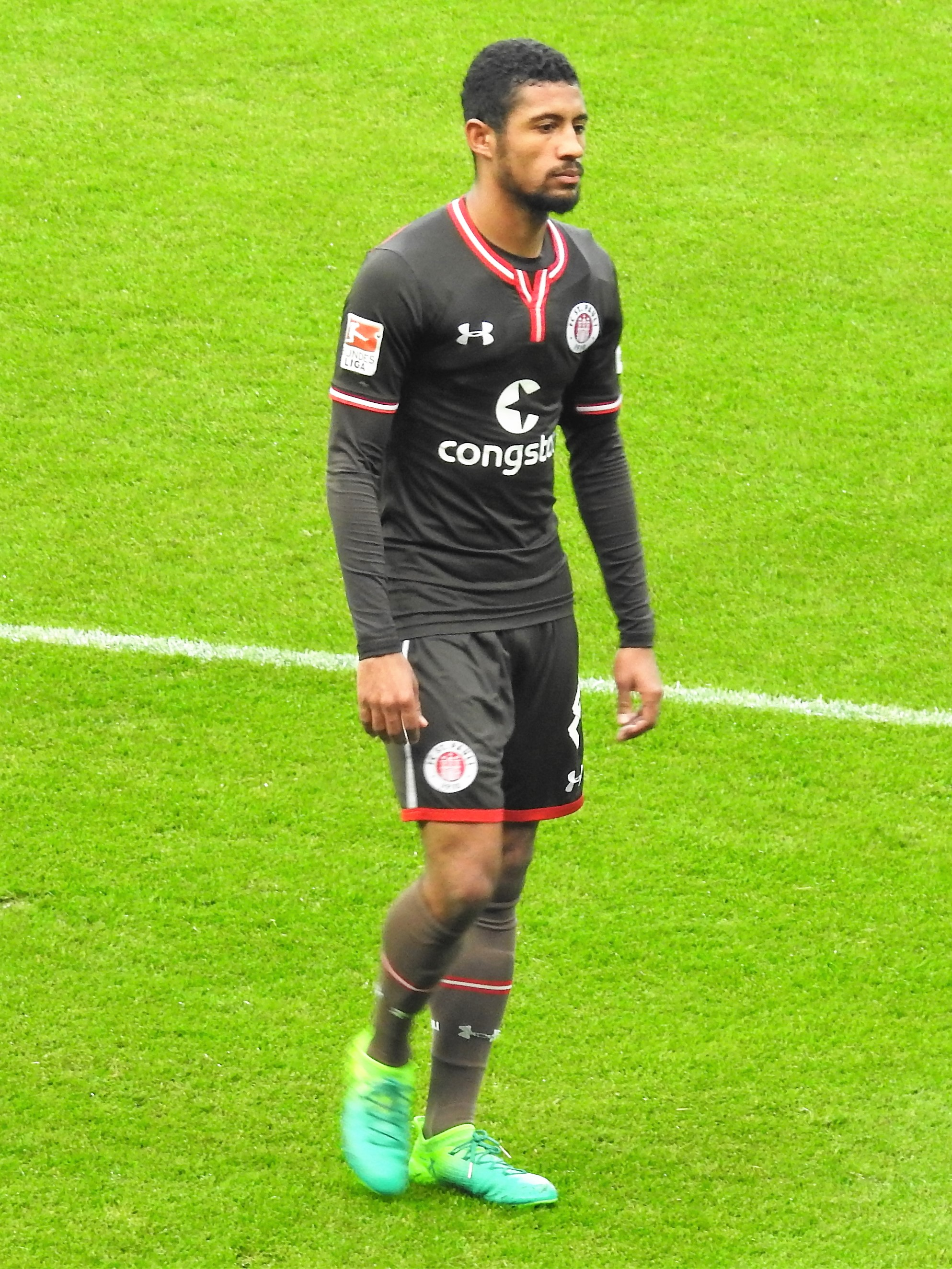 Jeremy Dudziak im Trikot des FC St.Pauli 2017